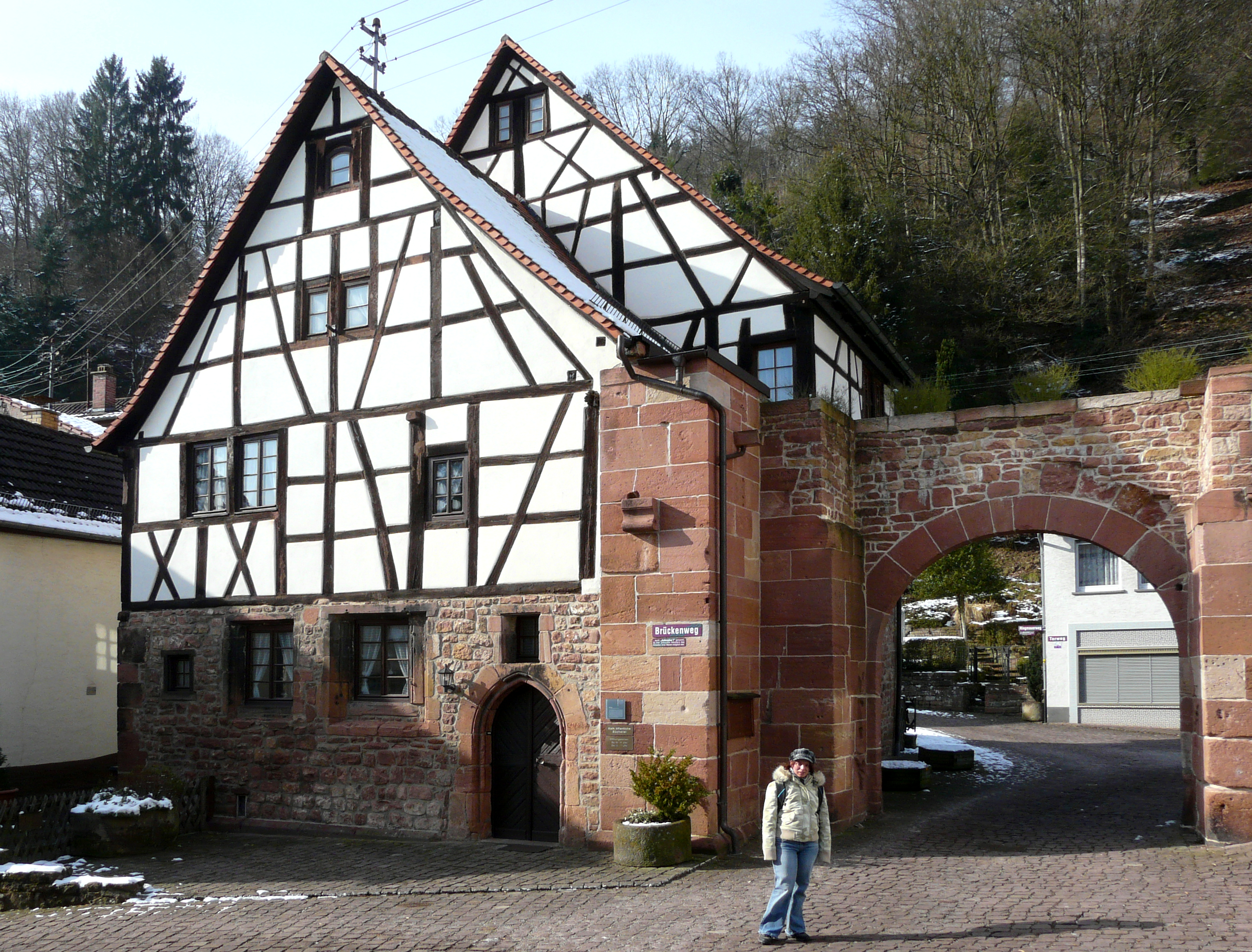 Klostertor (um 1200) und Torhaus (um 1600) in Schönau